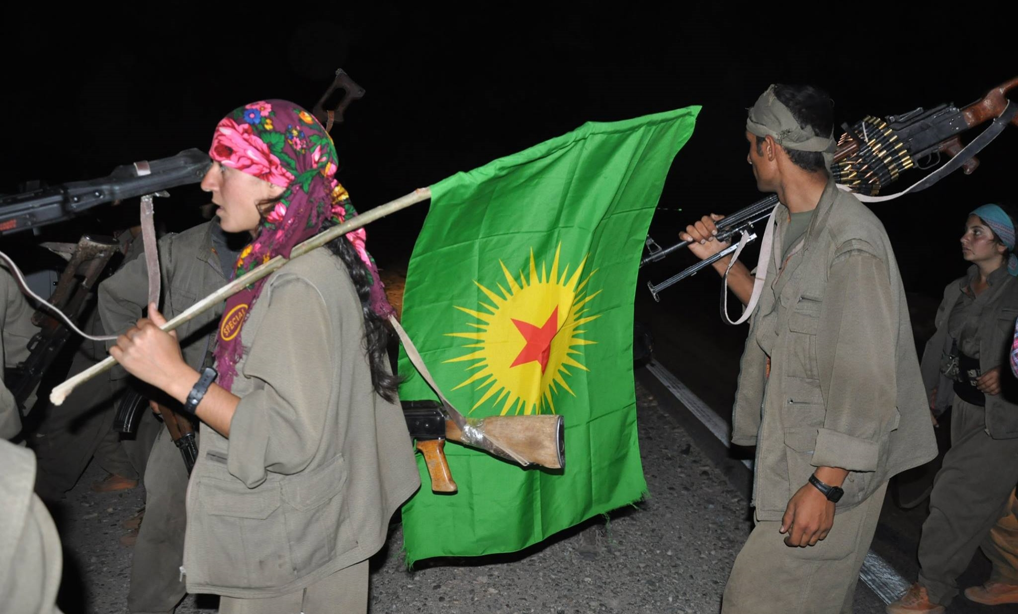 PKK fighters in Kirkuk